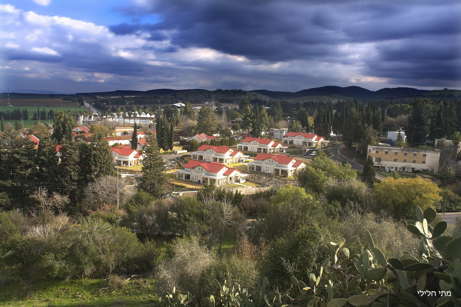 מערת הפלמ"ח במשמר העמק